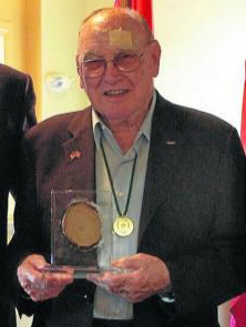 Pete Cenarrusa euskal-estatubatuarra